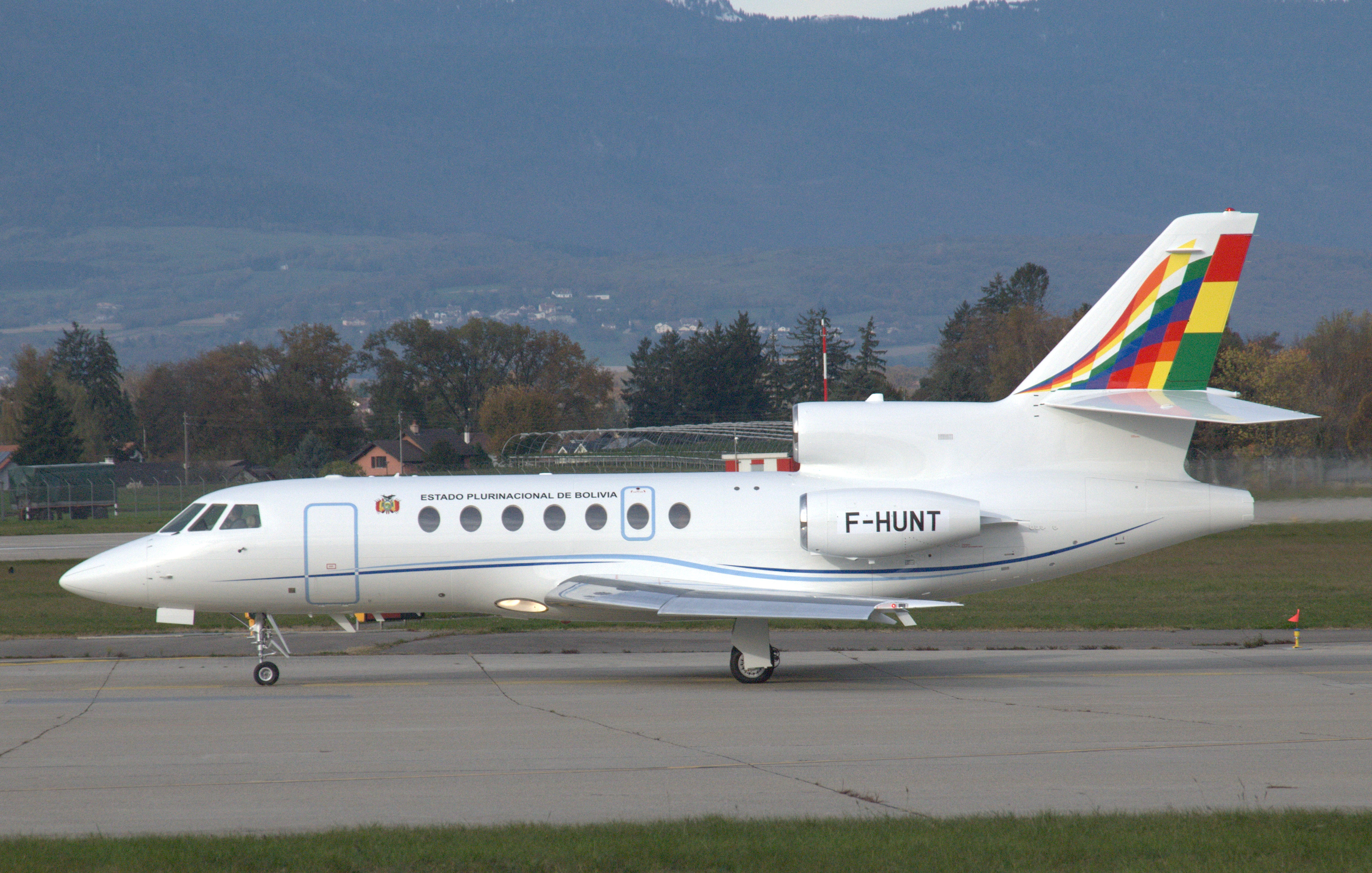 GVA 13.11.2013